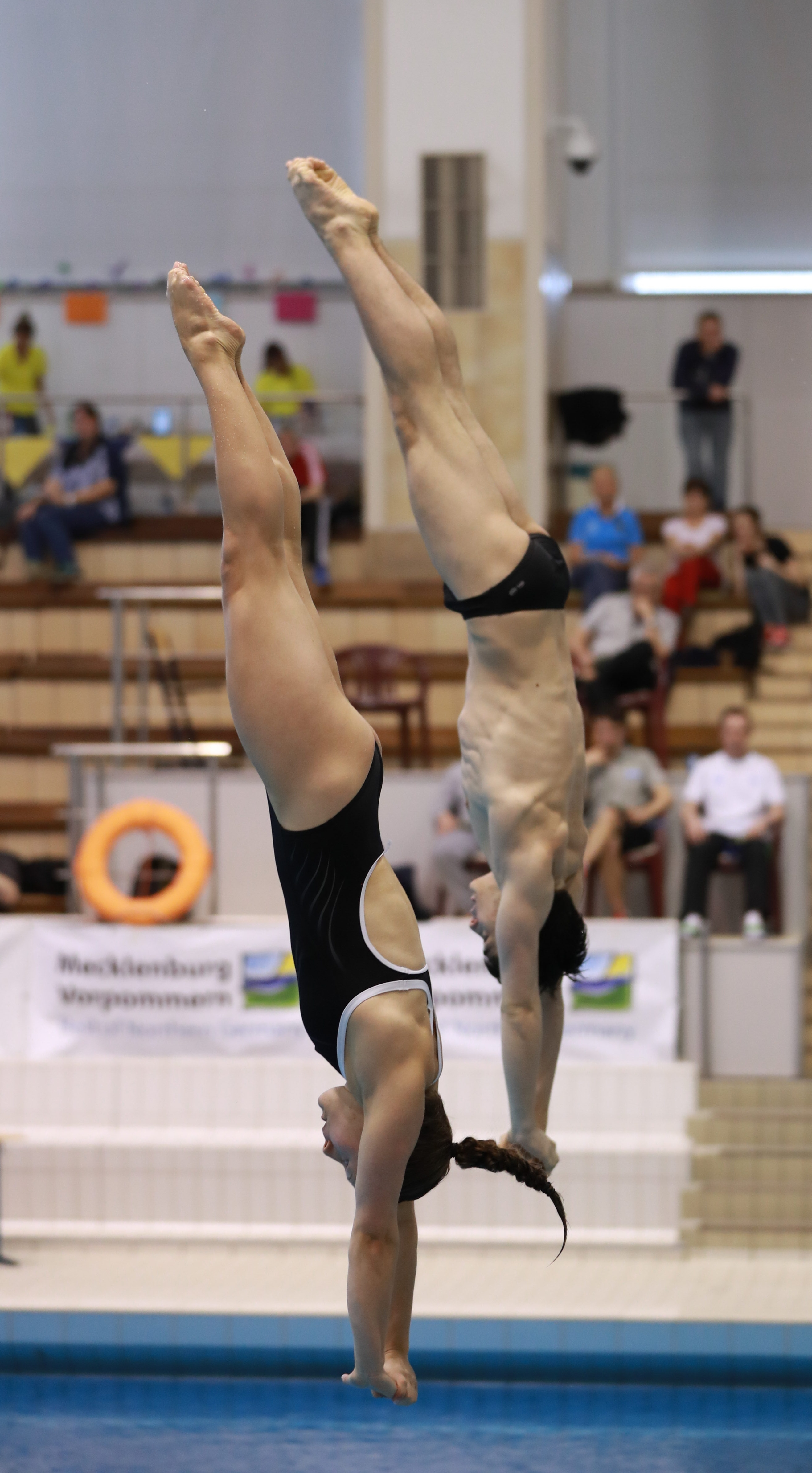 3m mixed Synchron Finale Sprung 1 bei den Internationalen Deutschen Hallenmeisterschaften im Wasserspringen Offene Klassen und Junioren. Abgebildet: Tina Punzel. Lou Massenberg.